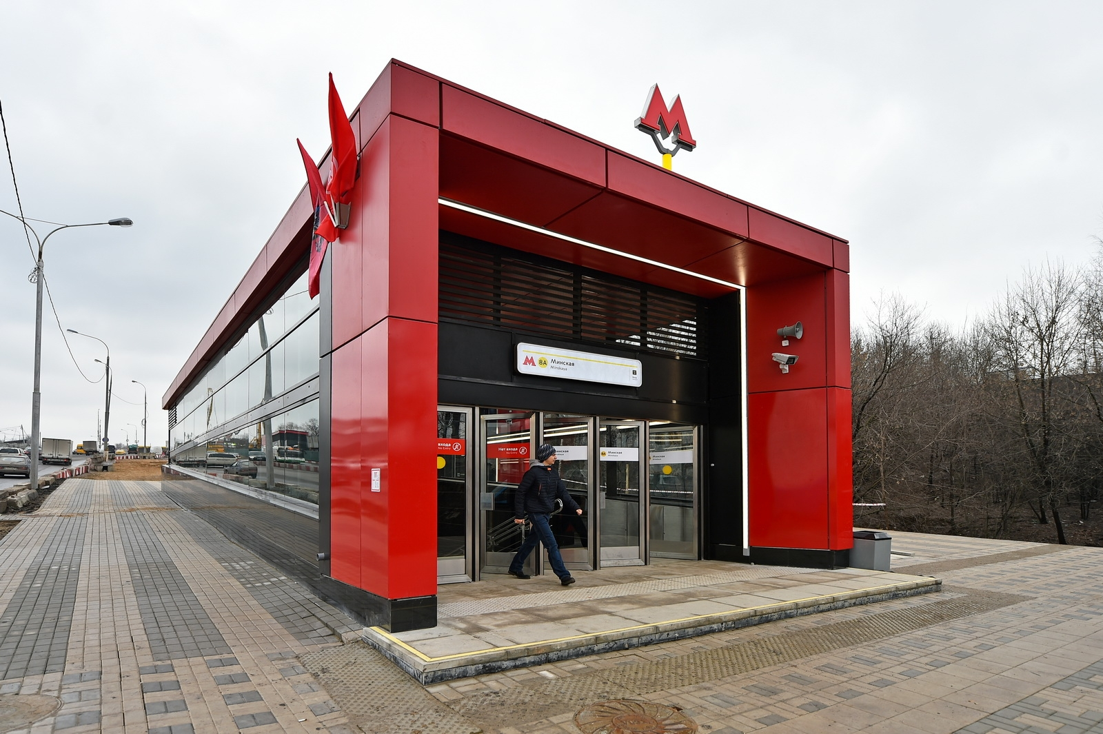 Станция Минская Московского метрополитена. Наружный вестибюль